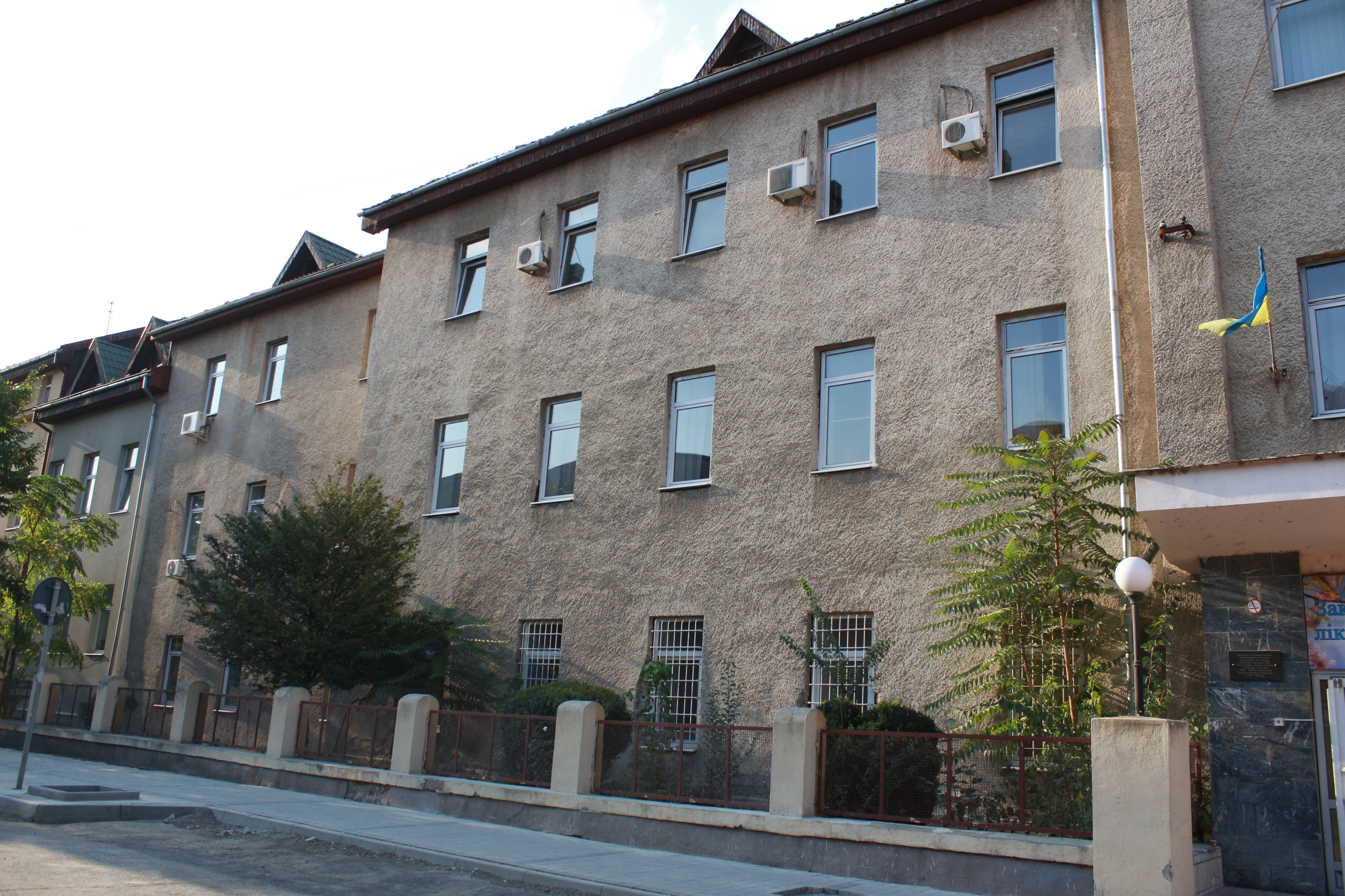 Ансамбль будинків обласної клінічної лікарні, Ужгород, вул. Капушанська, 22